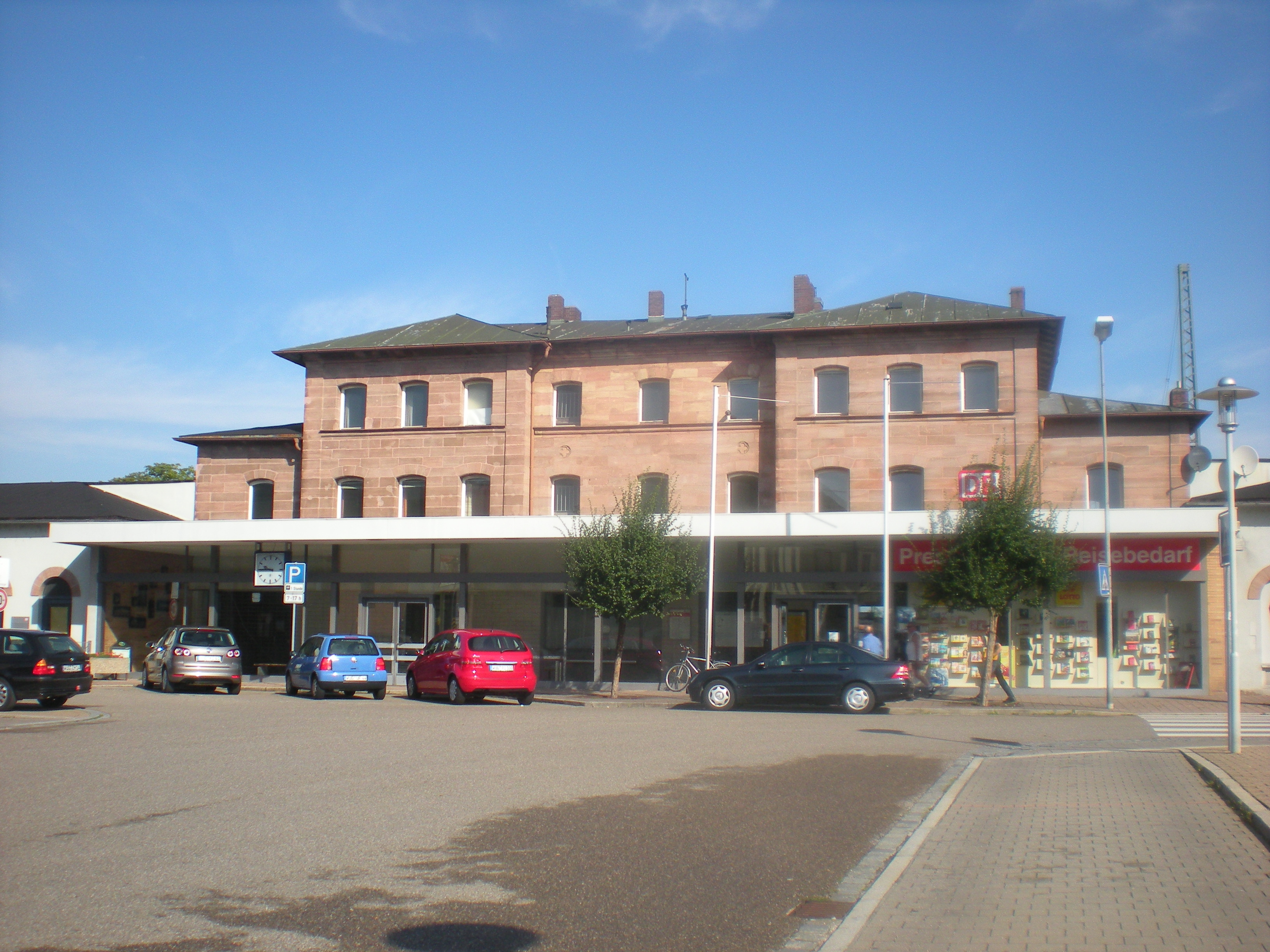 Straßenseite des Bahnhofsgebäudes Gunzenhausen